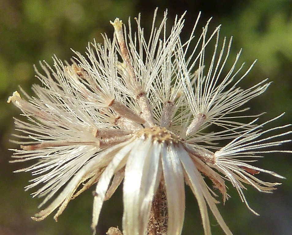 Dittrichia viscosa (Olivarda) : Capítulo en fructificación con cipselas in situ - Circunvalación Norte, Águilas, (Murcia, España).